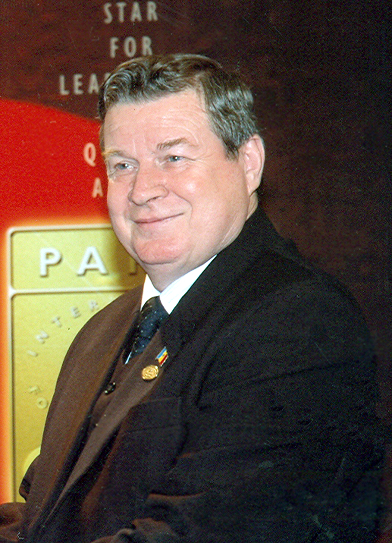 Scriitorul Ion Anton